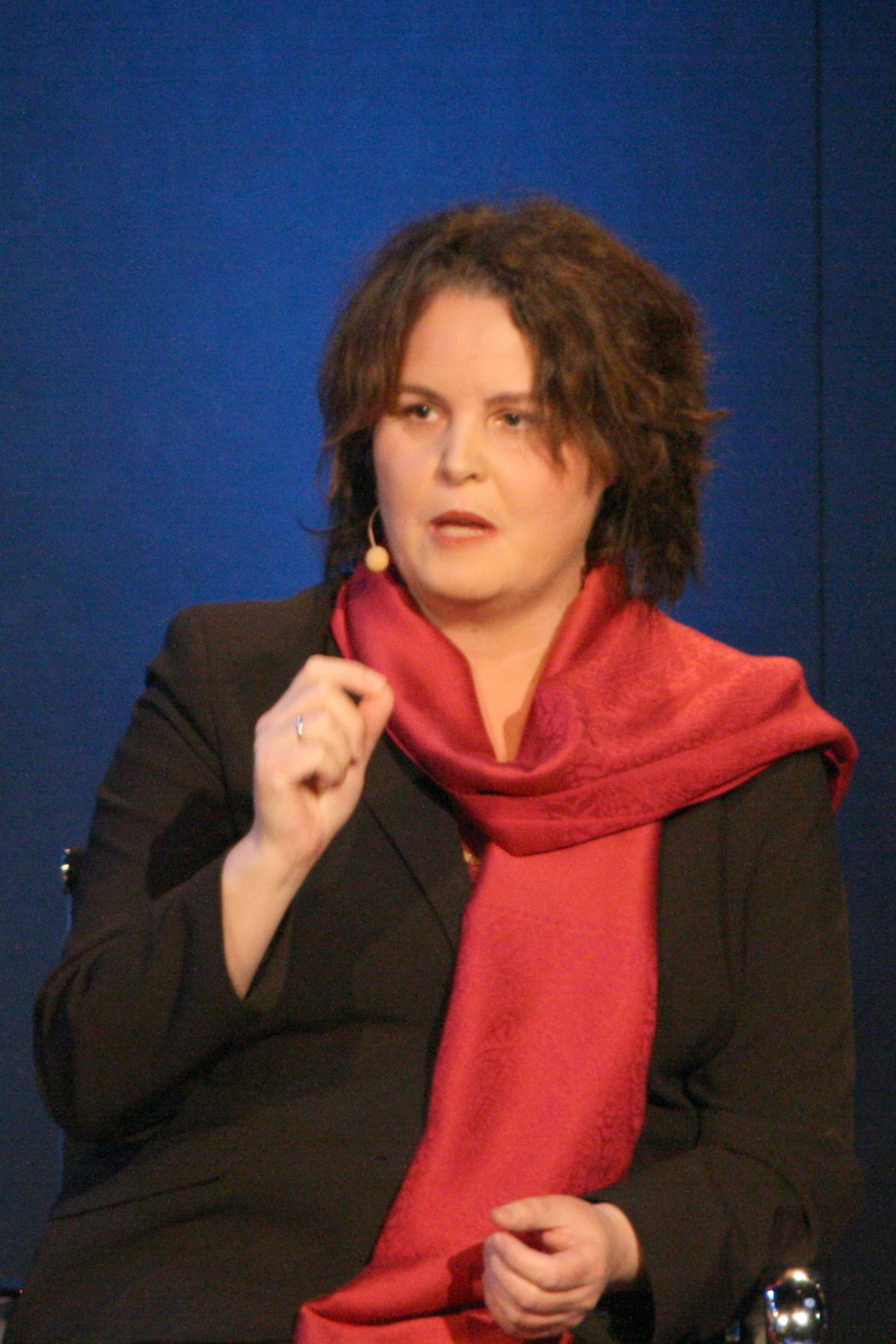 Sylvia Brustad, norsk politiker (Ap). Fra NHOs Årskonferanse 2009.